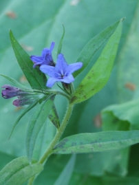 Erdei gyöngyköles